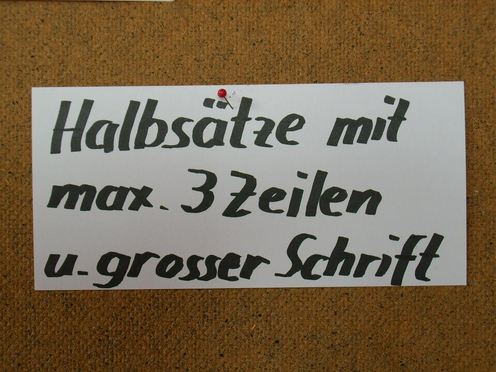 Moderationskarte, Halbsätze dreizeilig